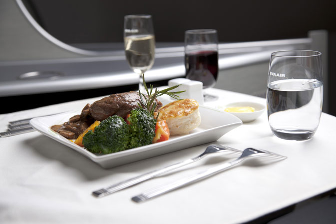 長榮商務艙美食